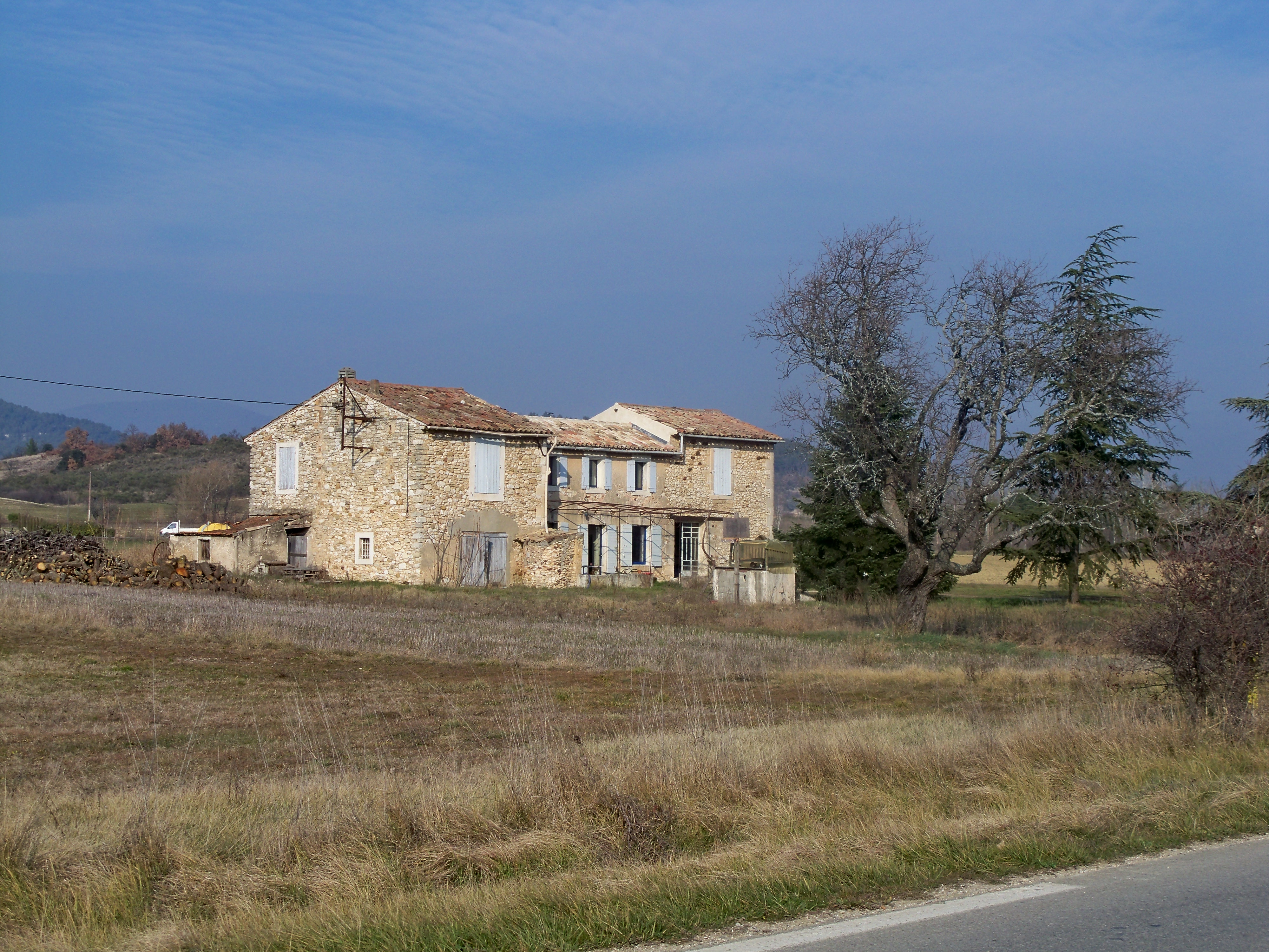 Maison à Terre à Bonnieux, Vaucluse, France